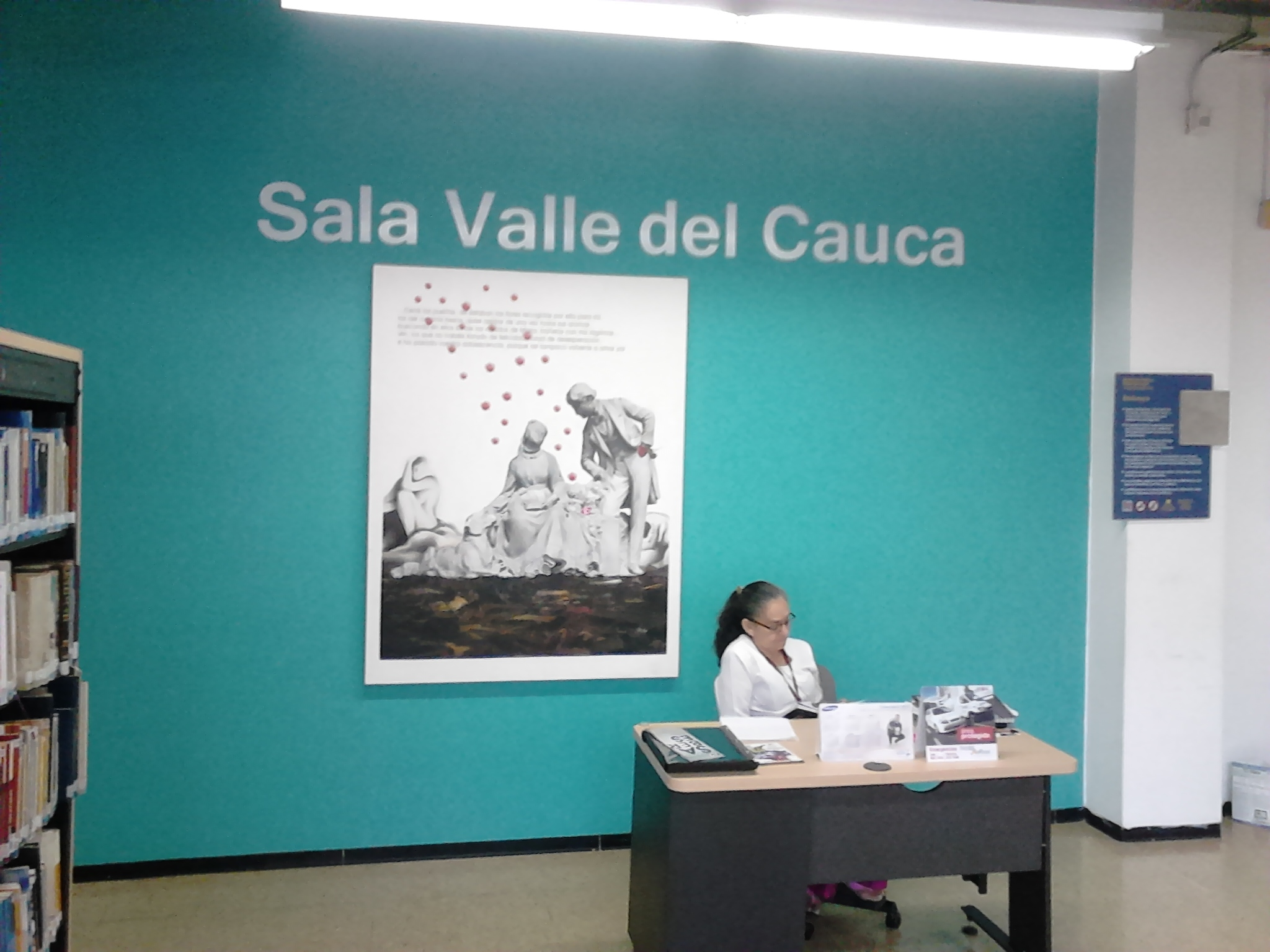 Biblioteca Departamental Jorge Garcés Borrero, en Santiago de Cali - Salón Valle del Cauca